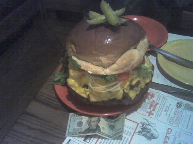 3lb burger at Denny's Beer Barrell